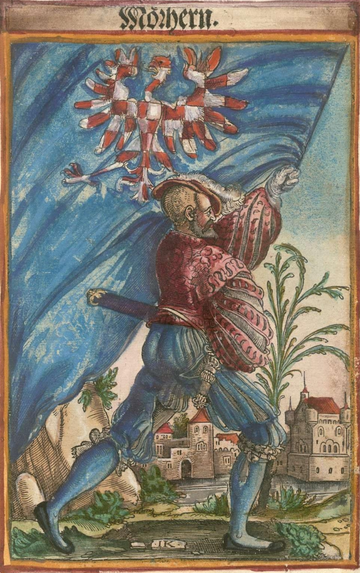 Znak Moravy. Historická moravská vlajka. In: Koebel, Jacob: Wapen. Des heyligen Römischen Reichs Teutscher nation, Der Churfürsten Fürsten Grauen Freihen Rittern Auch der merer theil Stett ... Auch wie ... die erwölung vn[d] krönung eynes Römischen Künigs vnd Keysers geschehen soll. Mit einer erclerung ... wie ein jedes wapen gefärbt oder gemalt werden sol, Franckfurth am Main, 1545 [VD16 K 1623].